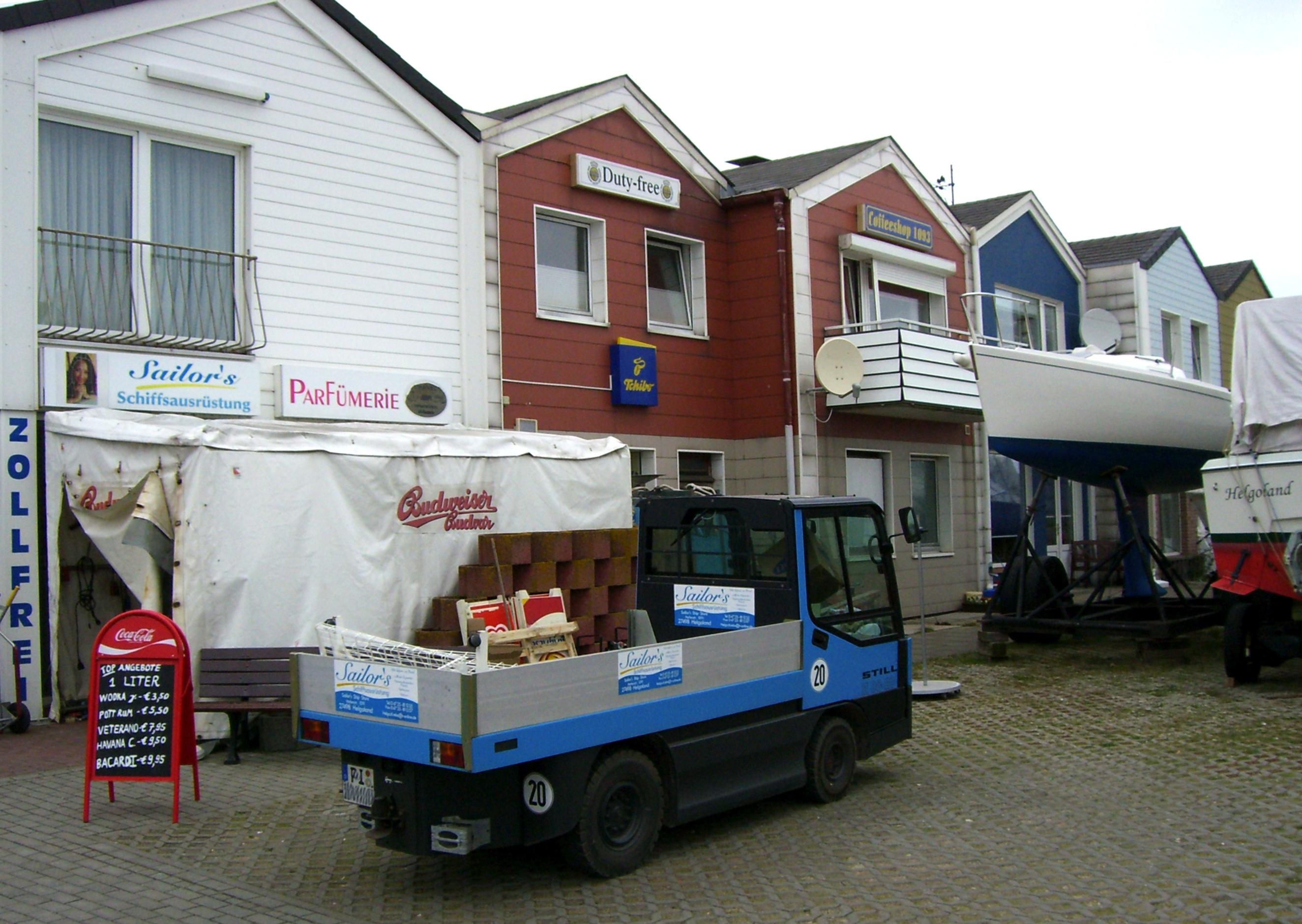 Helgoland, Elektrokarre vor Duty-Free-Läden